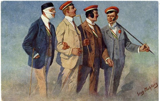 "Renommierbummel" (um 1900), Gemälde von Georg Mühlberg (1863-1925), Rechte abgelaufen. Verbindungsstudenten zeigen ihre frischen Schmisse bei einem Spaziergang, vermutlich am Morgen nach einem Pauktag. (heruntergeladen von: )